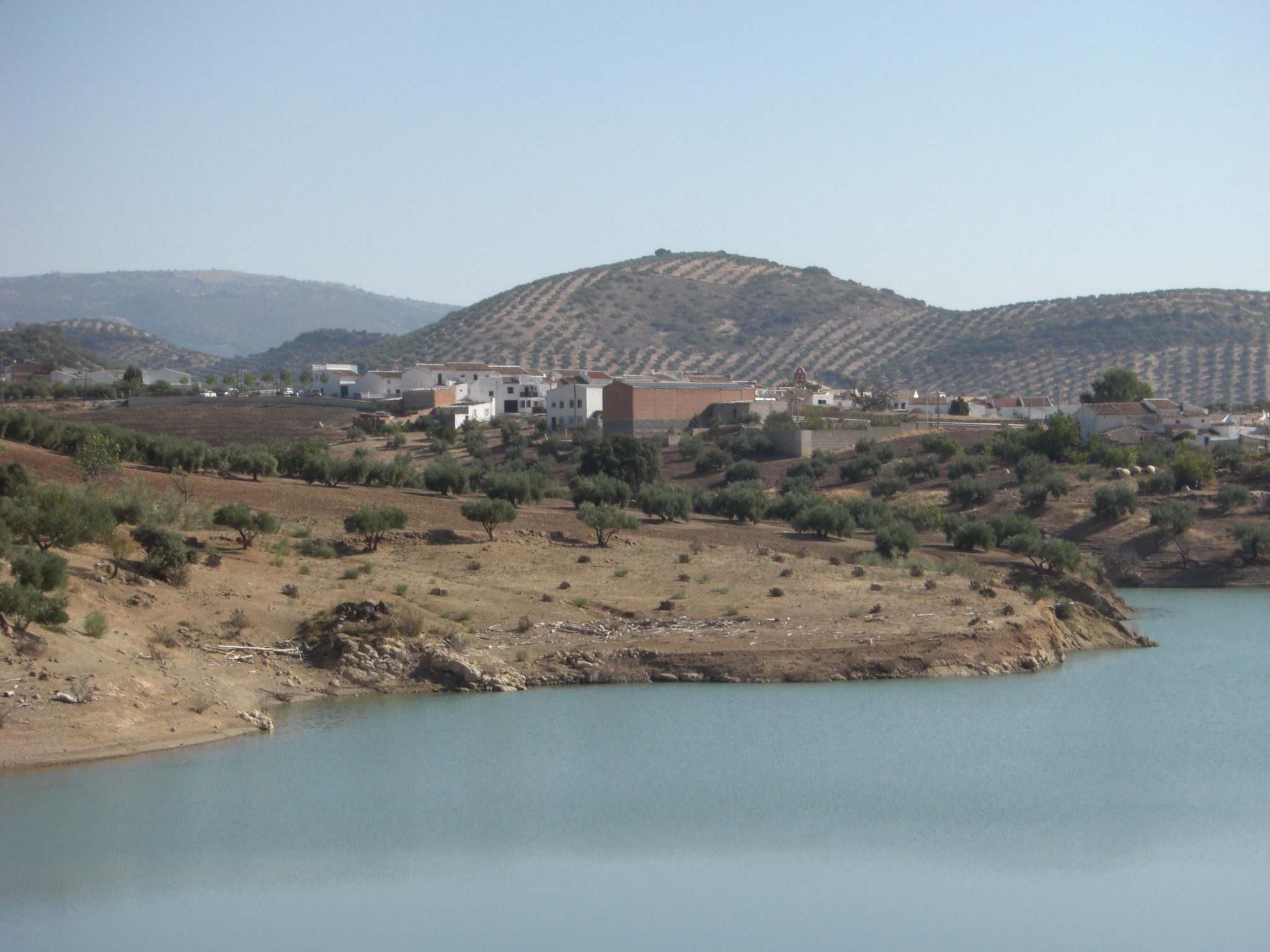 Vista de Las Casillas de Martos junto al embalse del Víboras.